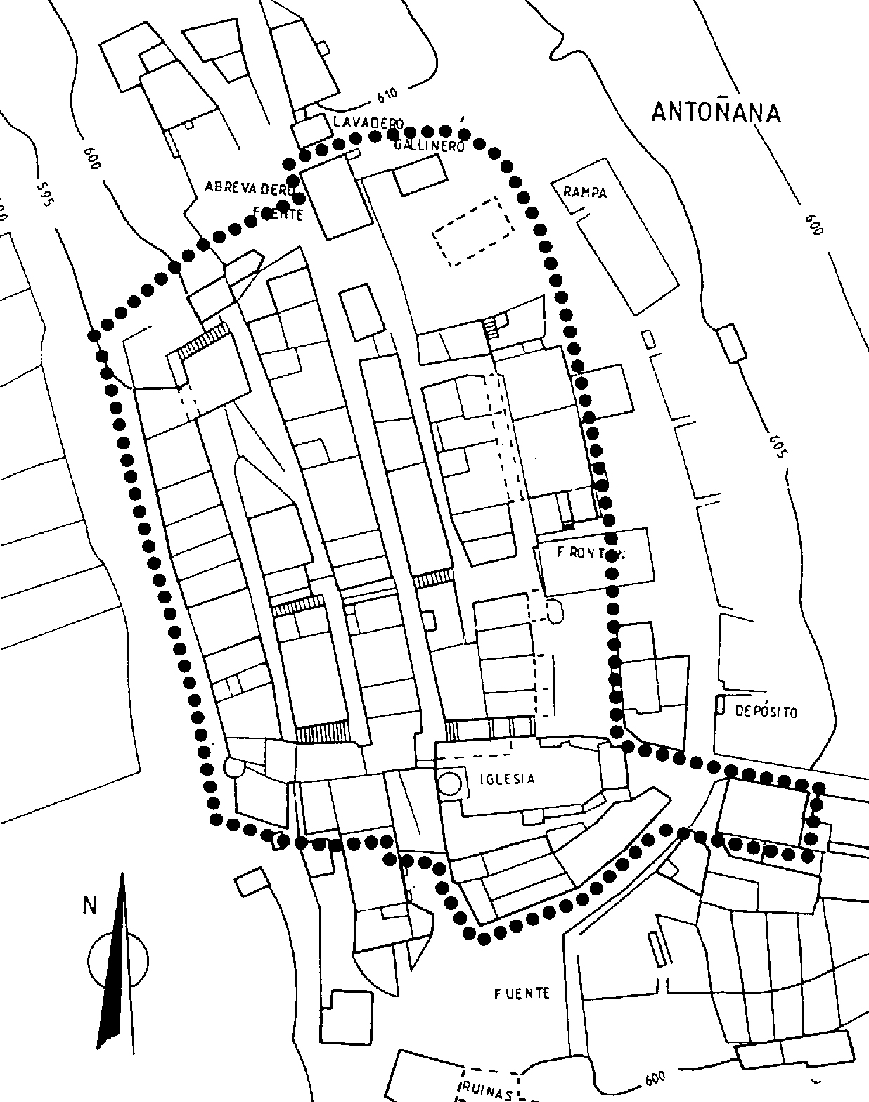 Antoñanako herrigune historikoaren oinplanoa